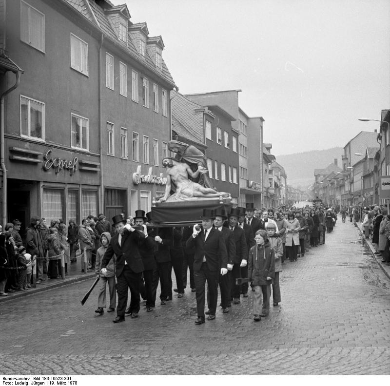 Heiligenstadt, Palmsonntagsprozession ADN-ZB/Ludwig 20.3.78 Heiligenstadt: Zur Prozession vereinigten sich am 19.3. 1978 in der Kreisstadt Heiligenstadt im Bezirk Erfurt Gläubige, Priester und Ordensleute des Eichsfeldes. Im Prozessionszug, der sich durch mehrere Straßen bewegte, wurden von den Gläubigen sechs lebensgroße Stationsbilder - hier die schmerzhafte Mutter - mitgeführt